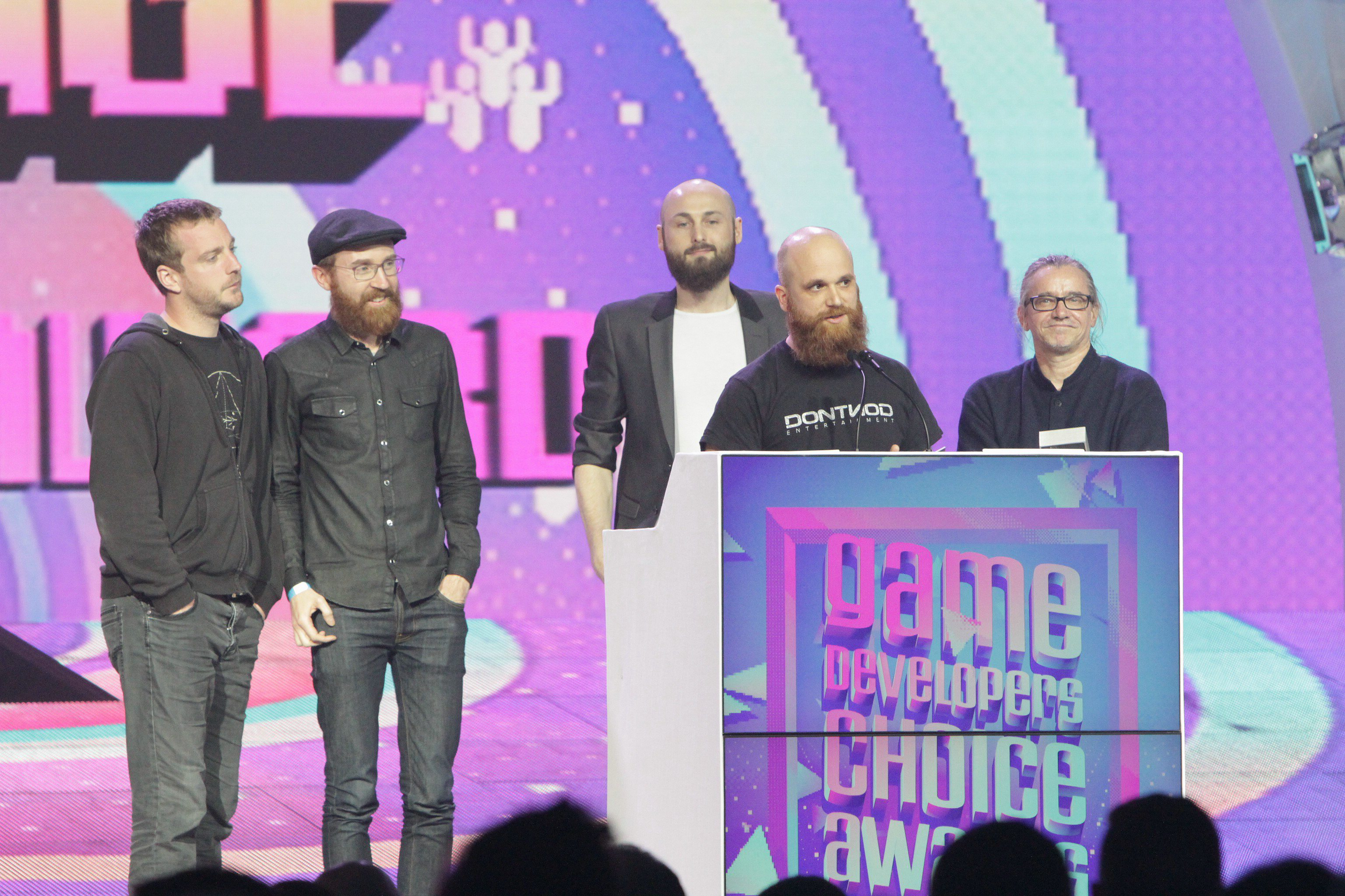 16-20_54_10-01-7D1_1022